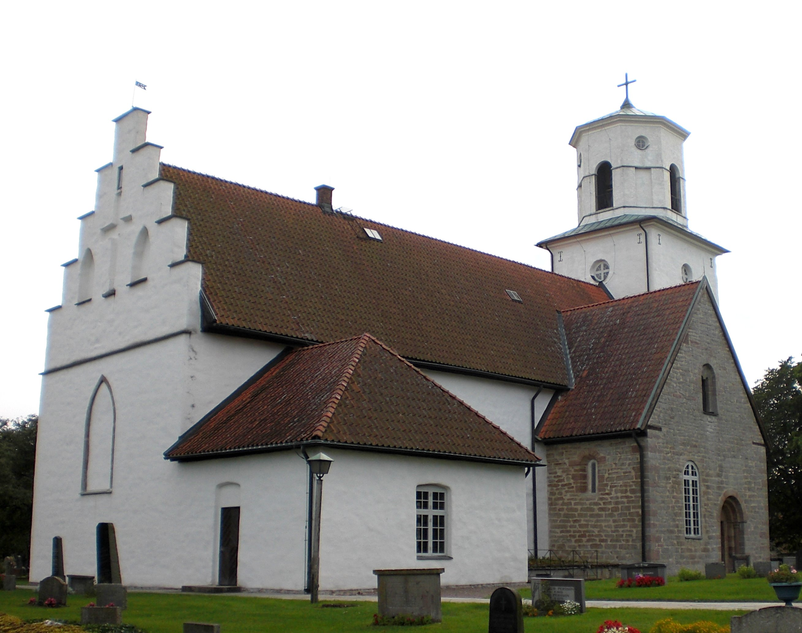 Kirche von Gärdslösa, Nordseite